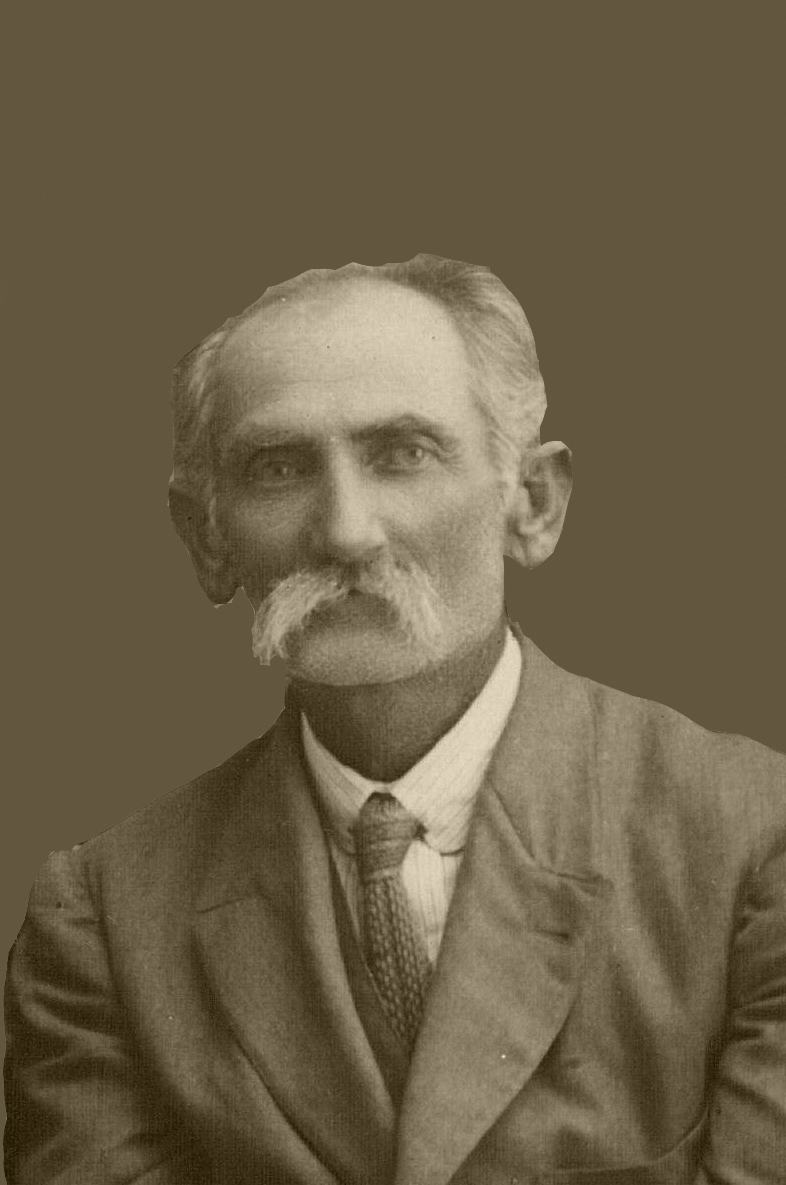 יחיאל מיכל פוחצ'בסקי היה איש העלייה הראשונה, מראשוני המושבה ראשון לציון, מומחה לגידול עצי פרי בכלל ולכרמי גפן בפרט.